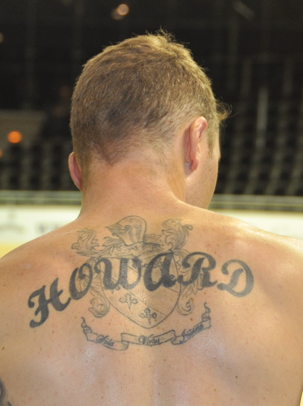 Leigh Howard, australischer Radsportler